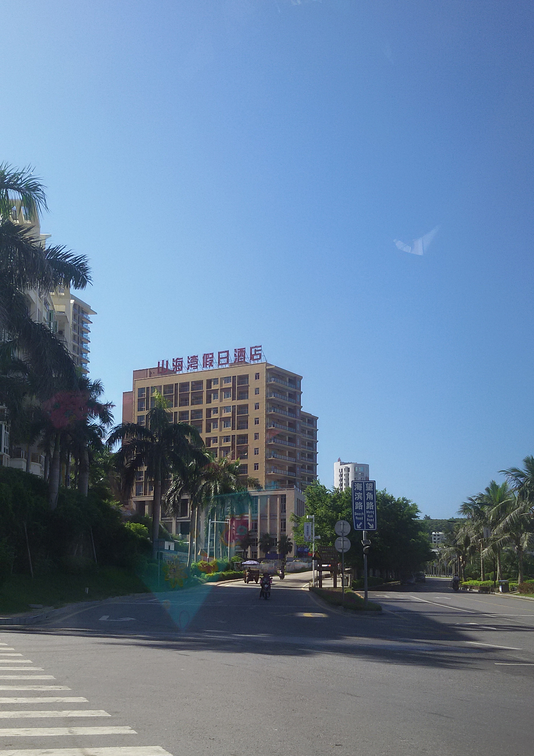 粵語: 山海湾假日酒店